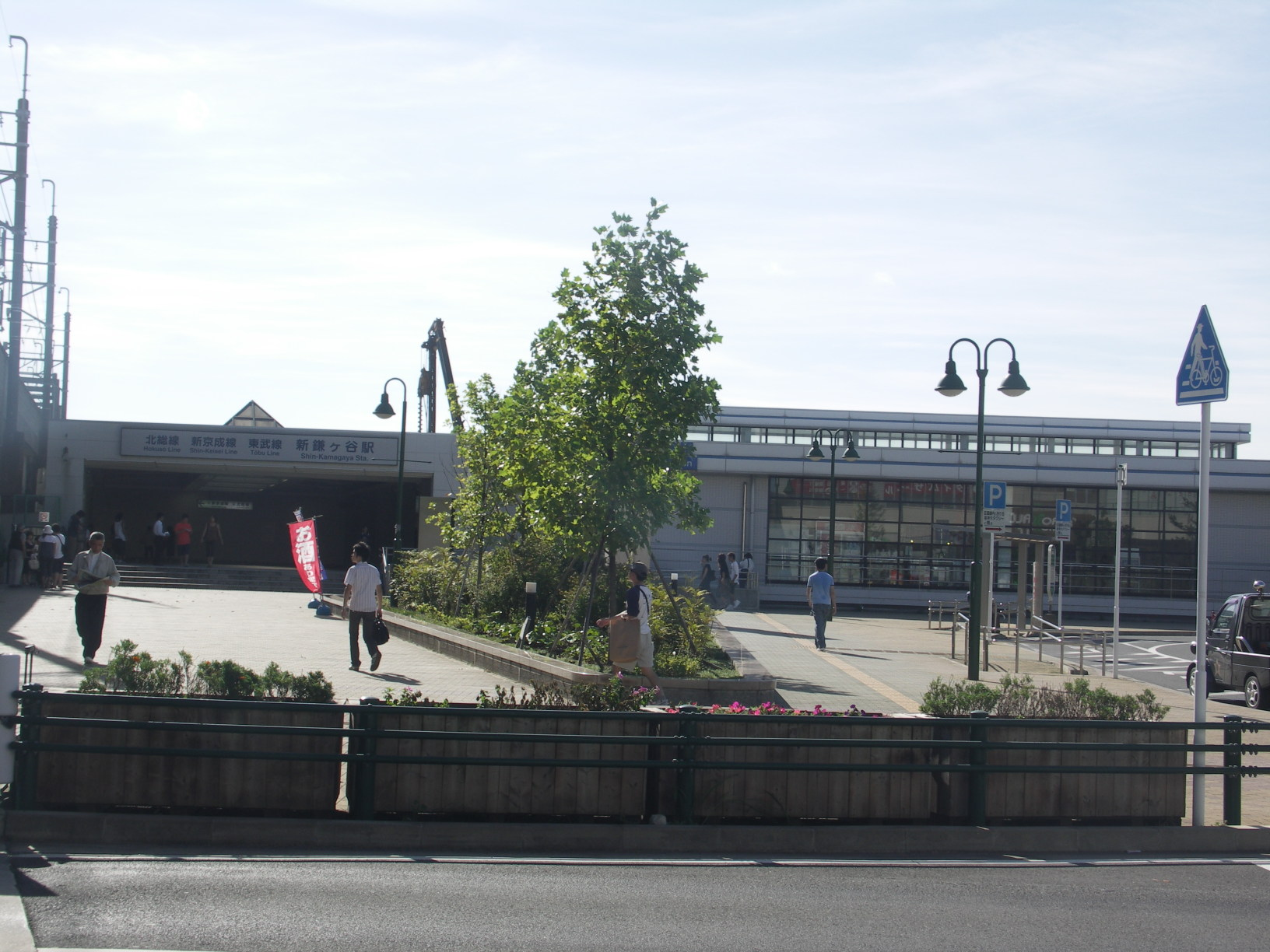 Shin-Kamagaya station, Tobu-Noda Line, Shin-Keisei Line, Hokuso Line, Chiba, Japan, 新鎌ヶ谷駅